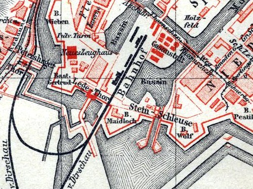 Gdańsk, stacja kolejowa Brama Nizinna z otoczeniem.